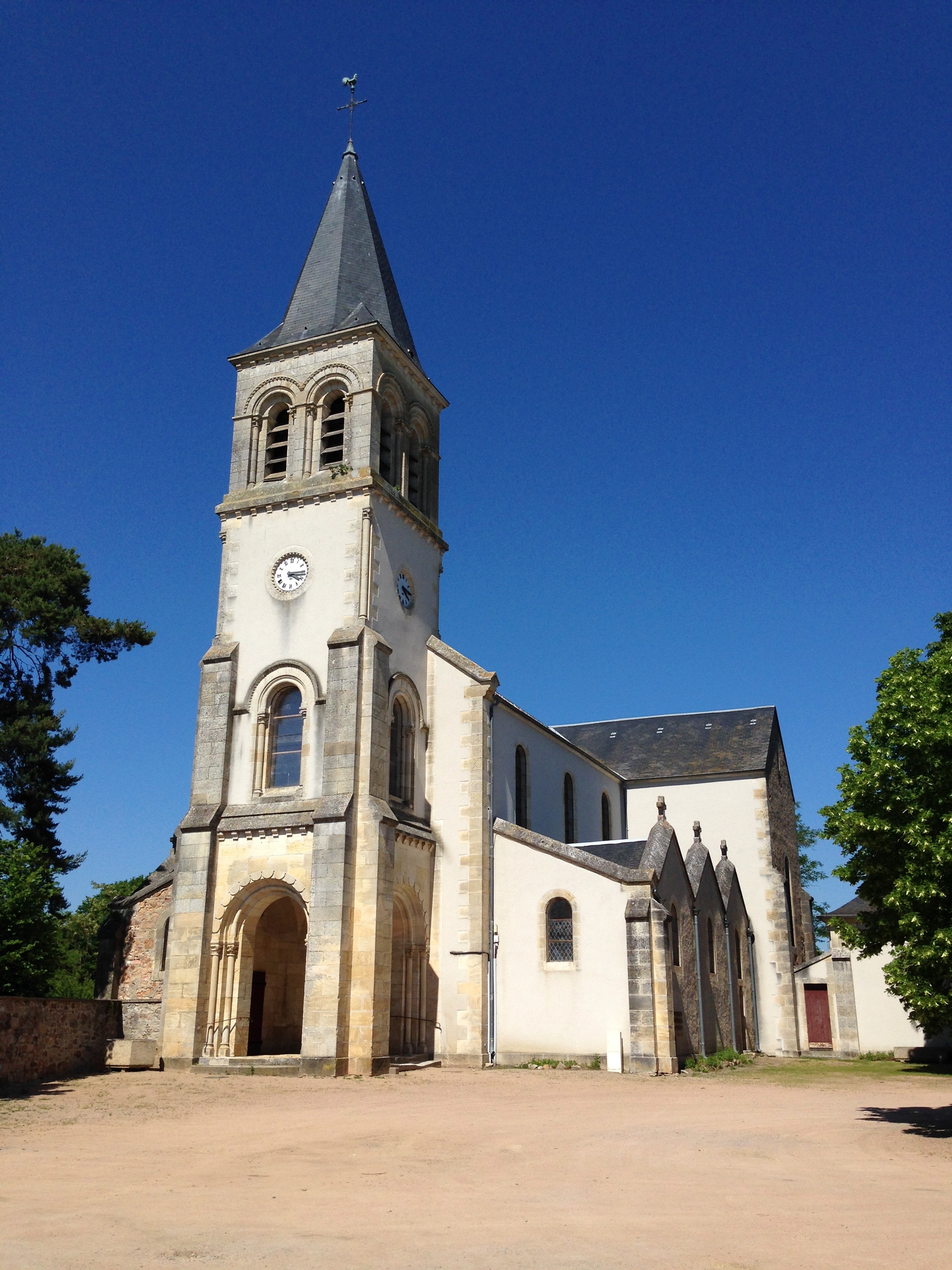 Saulzais-le-Potier Église Saint-Outrille